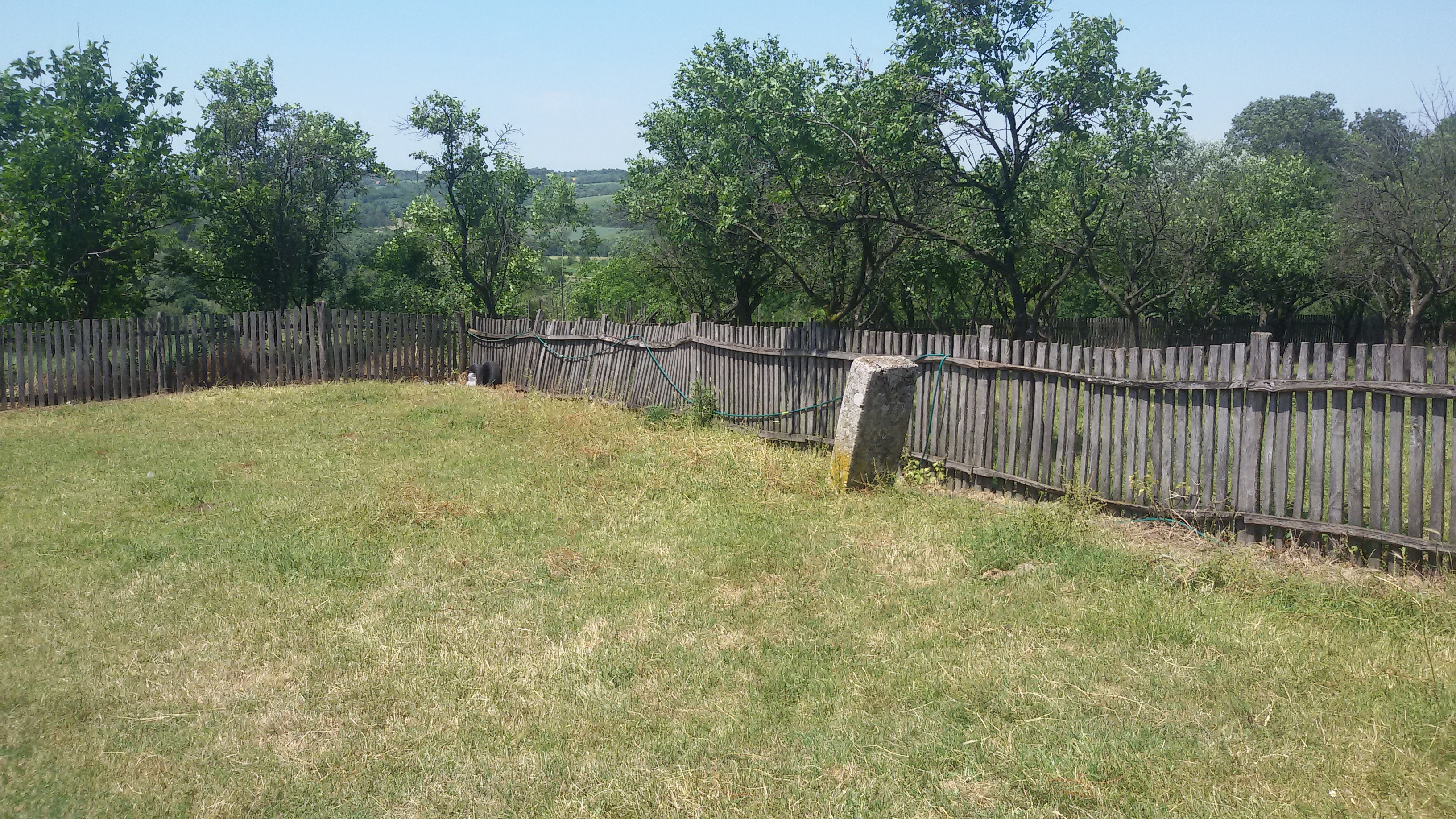 Белег у ливади на Окапини, који означава где је првобитно постављена Црква брвнара